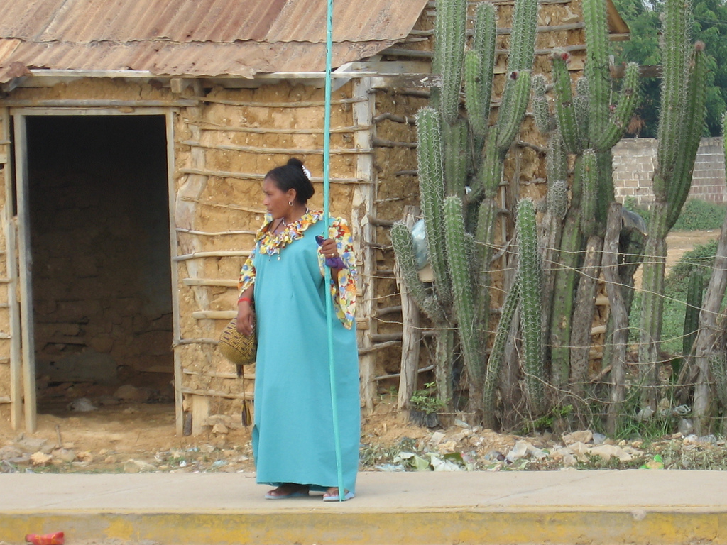 Mujer Wayuu in Manaure, Guajira (Colombia)